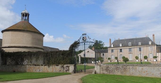 Château de Touchebredier, le colombier, la grille et le chateau principal, avec la pelouse bien tondue devant le mur de la grille